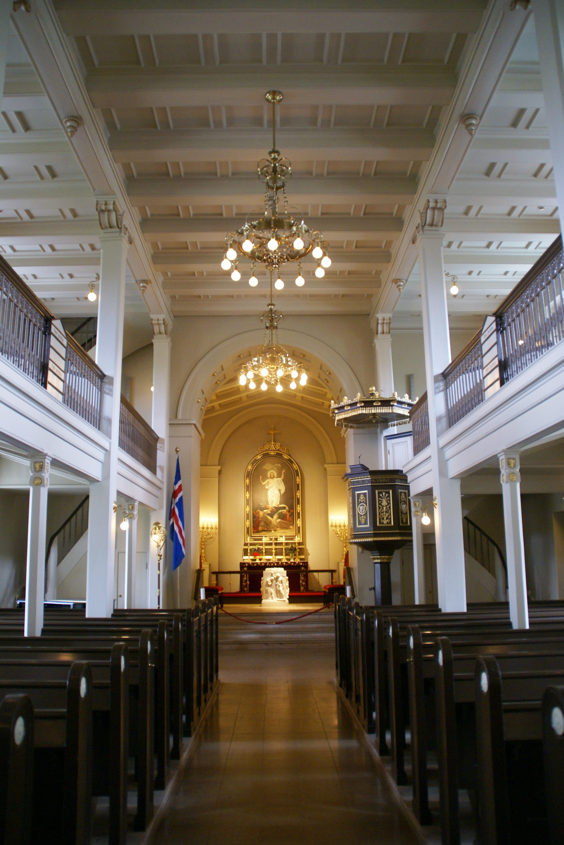 Domkirche Reykjavik